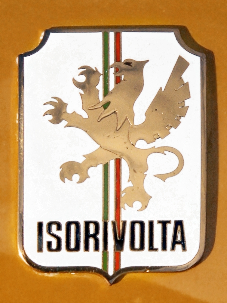 Iso Rivolta motif